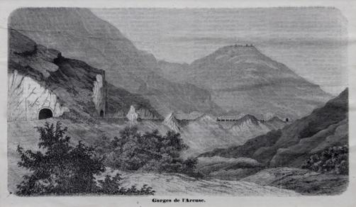 Gorges de l'Areuse, ligne ferroviaire Franco-SuisseTechnique: Gravure sur bois, xylographie